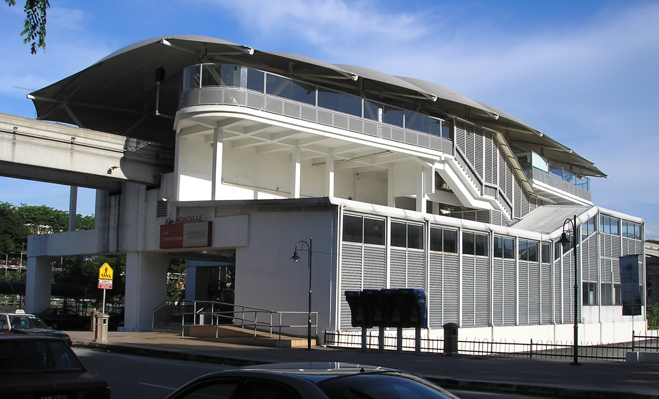 The Tun Sambathan station (Kuala Lumpur Monorail) (exterior), Kuala Lumpur, Malaysia.